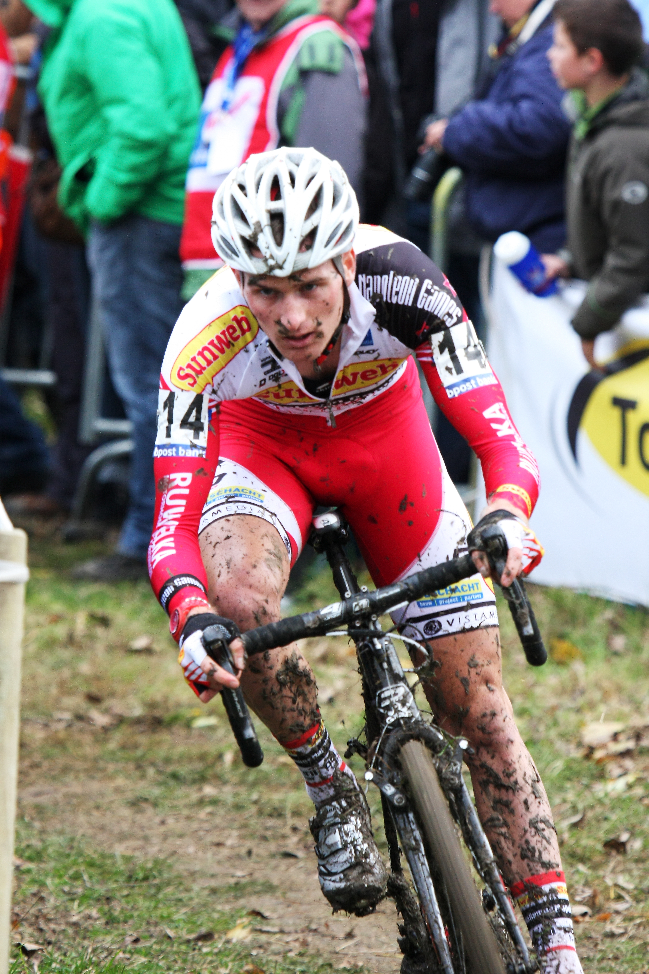 Jim Aernouts tijdens Koppenbergcross 2013